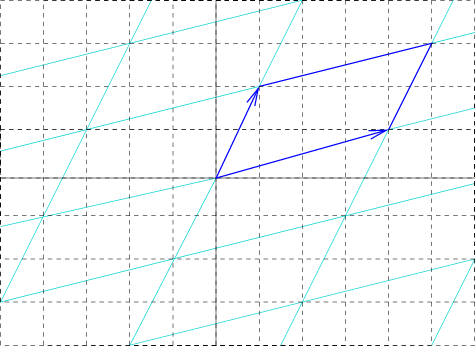 Fundamental Parallelogram